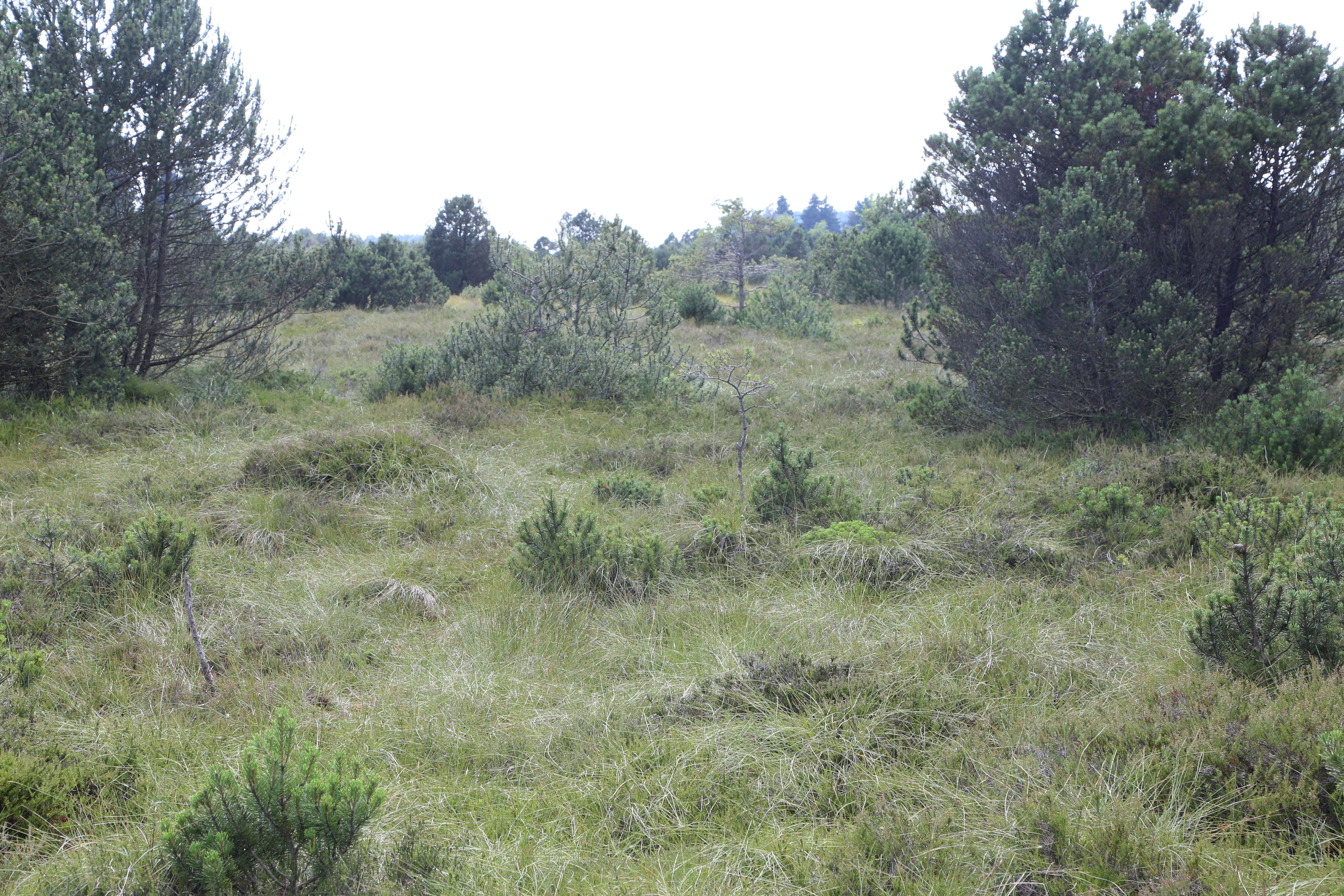 Altenbergfilz nördlich Thankirchen, Dietramszell; Landschaftsschutzgebiet LSG-00055.01